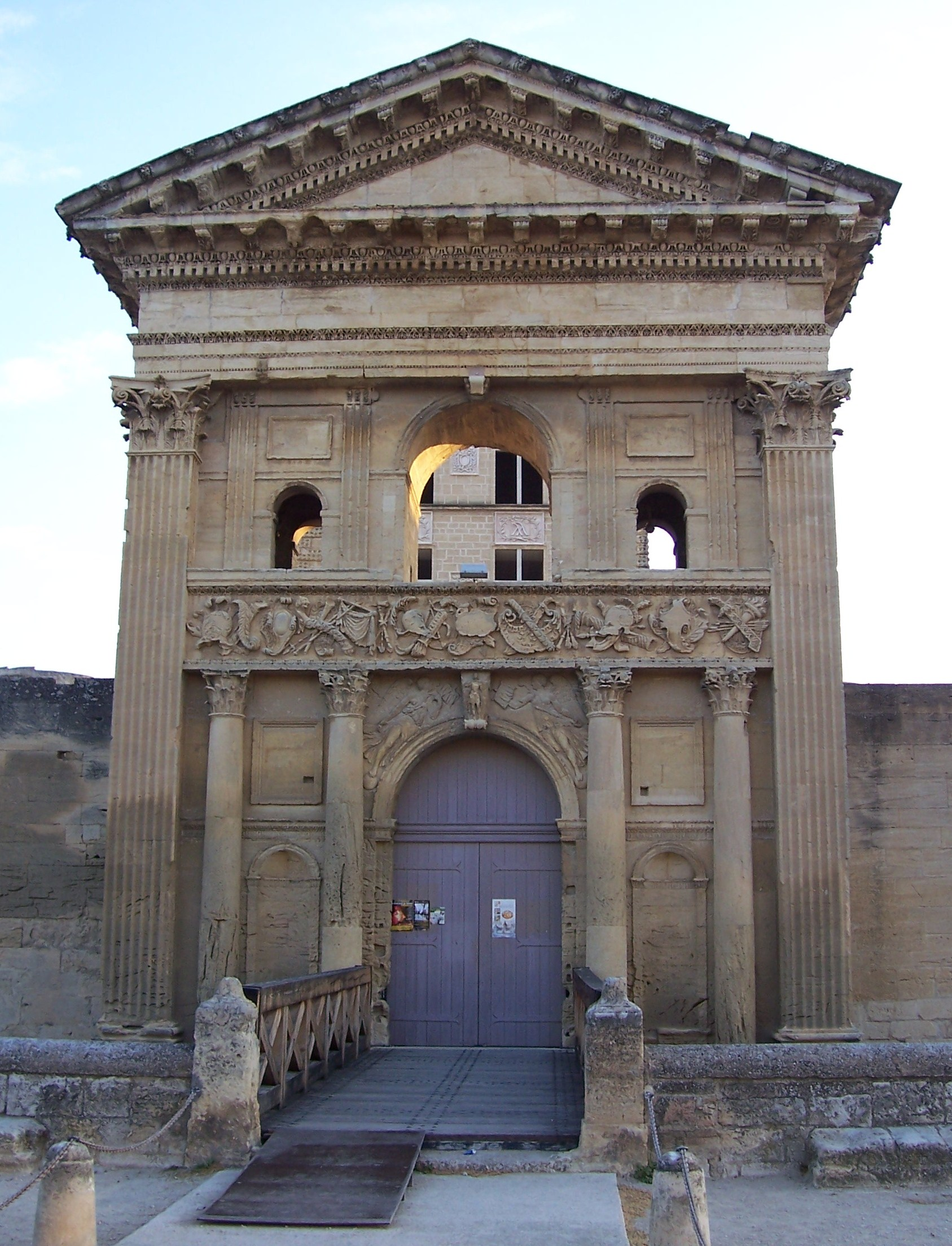 portail du château de la Tour-d'Aigues